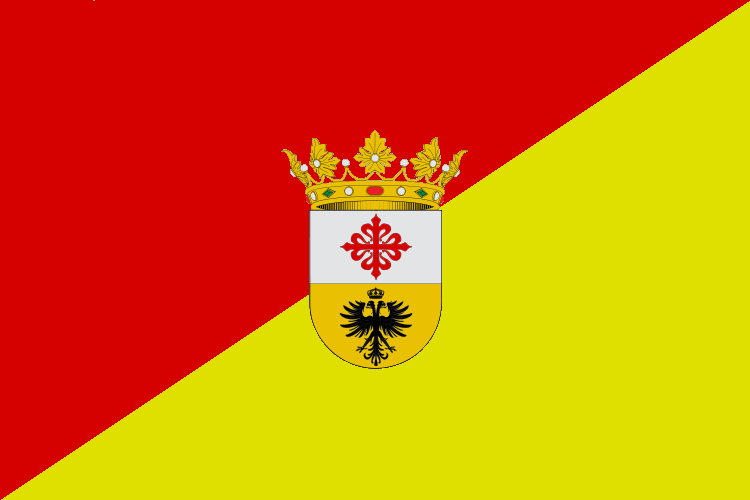 Escudo del municipio de Picón (Ciudad Real)